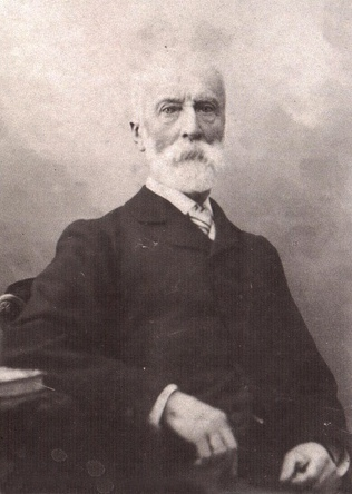 Фото Андриана Семеновича Мазараки